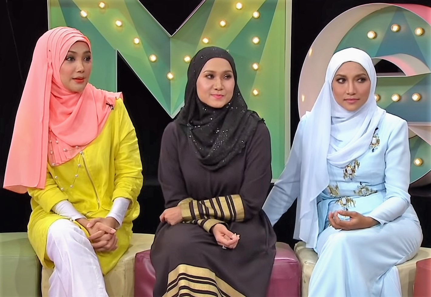 MeleTOP - Pengalaman Baru Setelah Berhijab Erra, Amy & Ziana Ep138 [23.6.2015] Alhamdulillah. Semakin cantik dan hot diva kita Erra Fazira, Amy Mastura & Ziana Zain ni setelah mengenekan penampilan baru. Sejukk je hati memandang. Apa kata kita dengar apa dorang punya cerita. #MeleTOP!